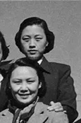 上为王昆，下为演员白杨